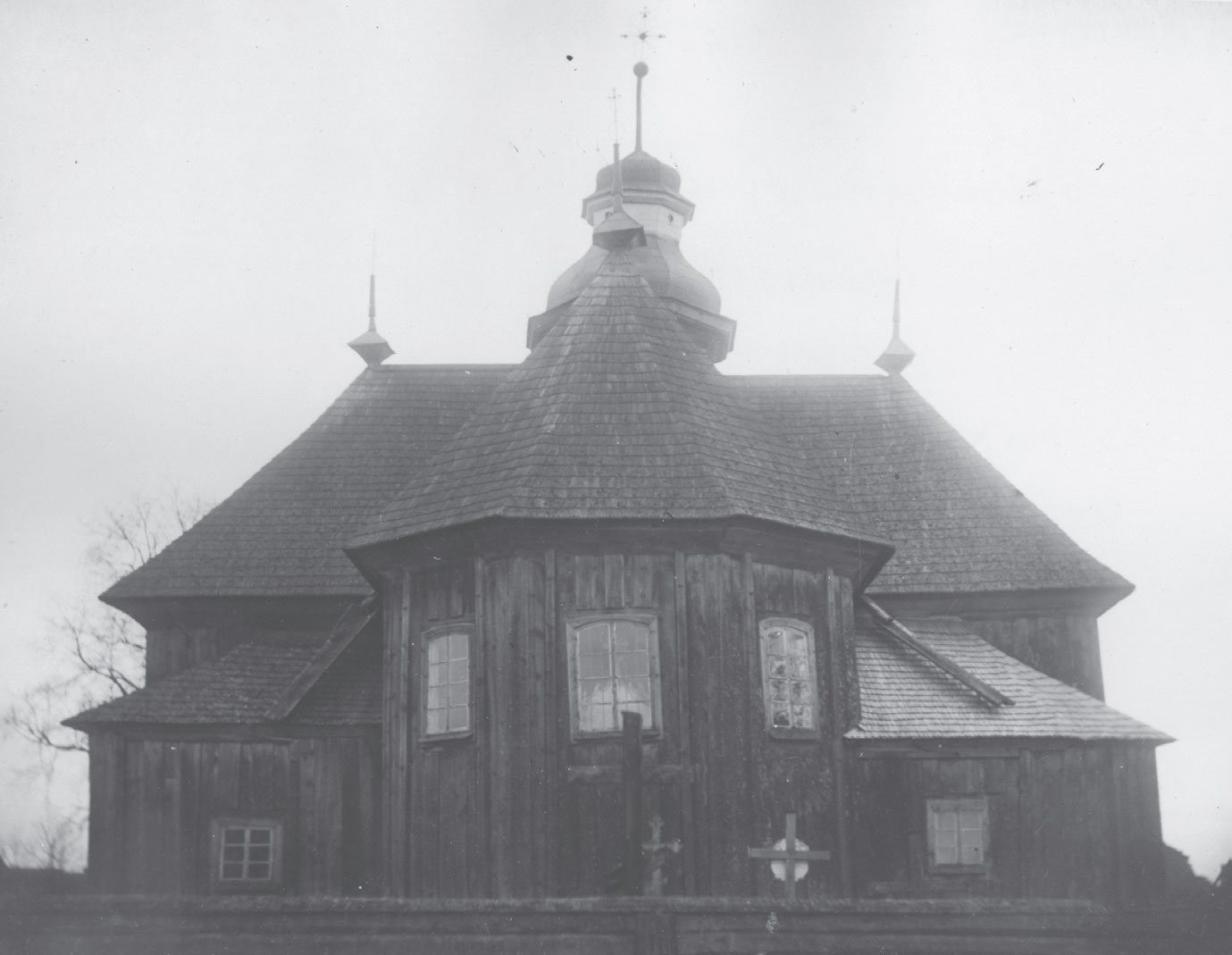 Беларуская (тарашкевіца): Галоўчыцы (Hałoŭčycy). Царква